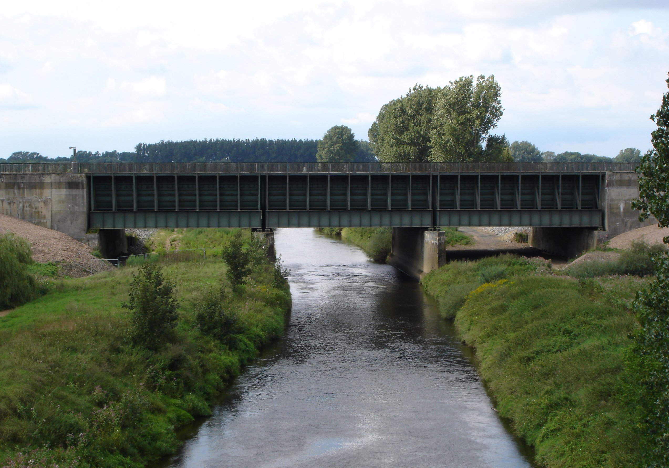 Die Kanalüberführung bei Münster-Gelmer, Westfalen, Deutschland: Südansicht der Überführung der Neuen Fahrt